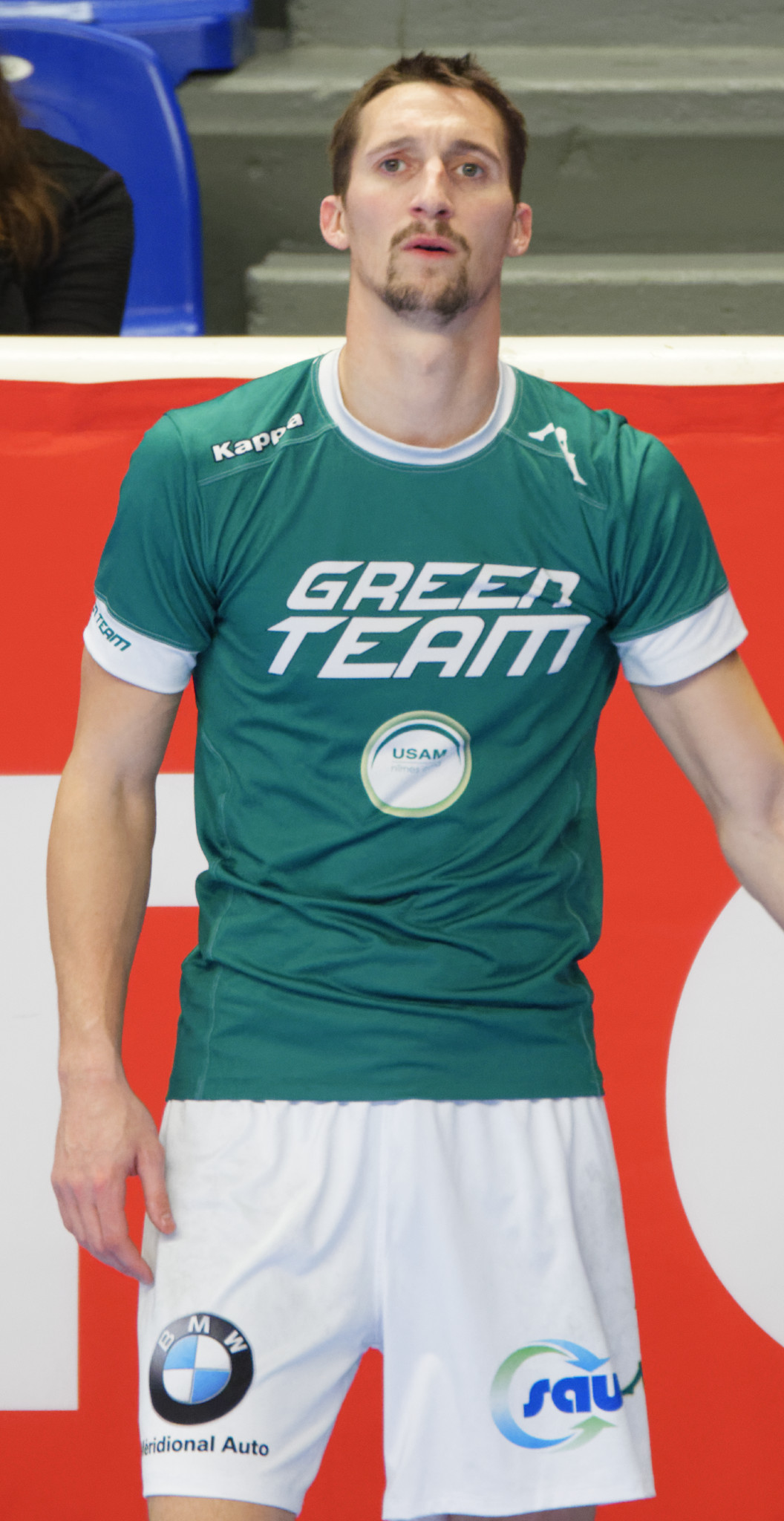 Match de la 18e journée de LNH entre le PSG Handball et l'USAM Nîmes. A Coubertin, le 11 mars 2015.